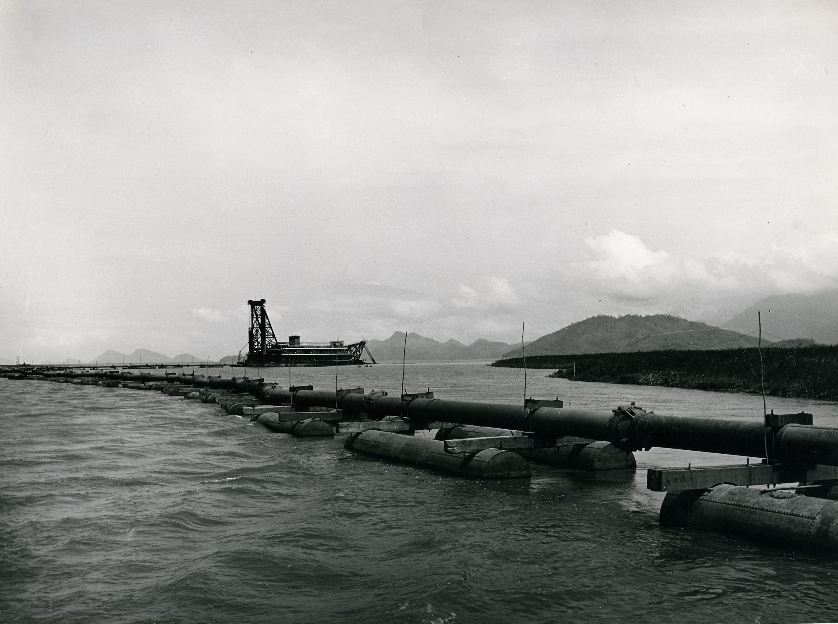 Fotografia do Fundo Correio da Manhã, sob a guarda do Arquivo Nacional.